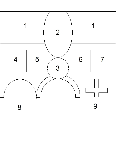 Disposition des fresques sur le mur est de la nef de l'église Saint-Martin de Vic